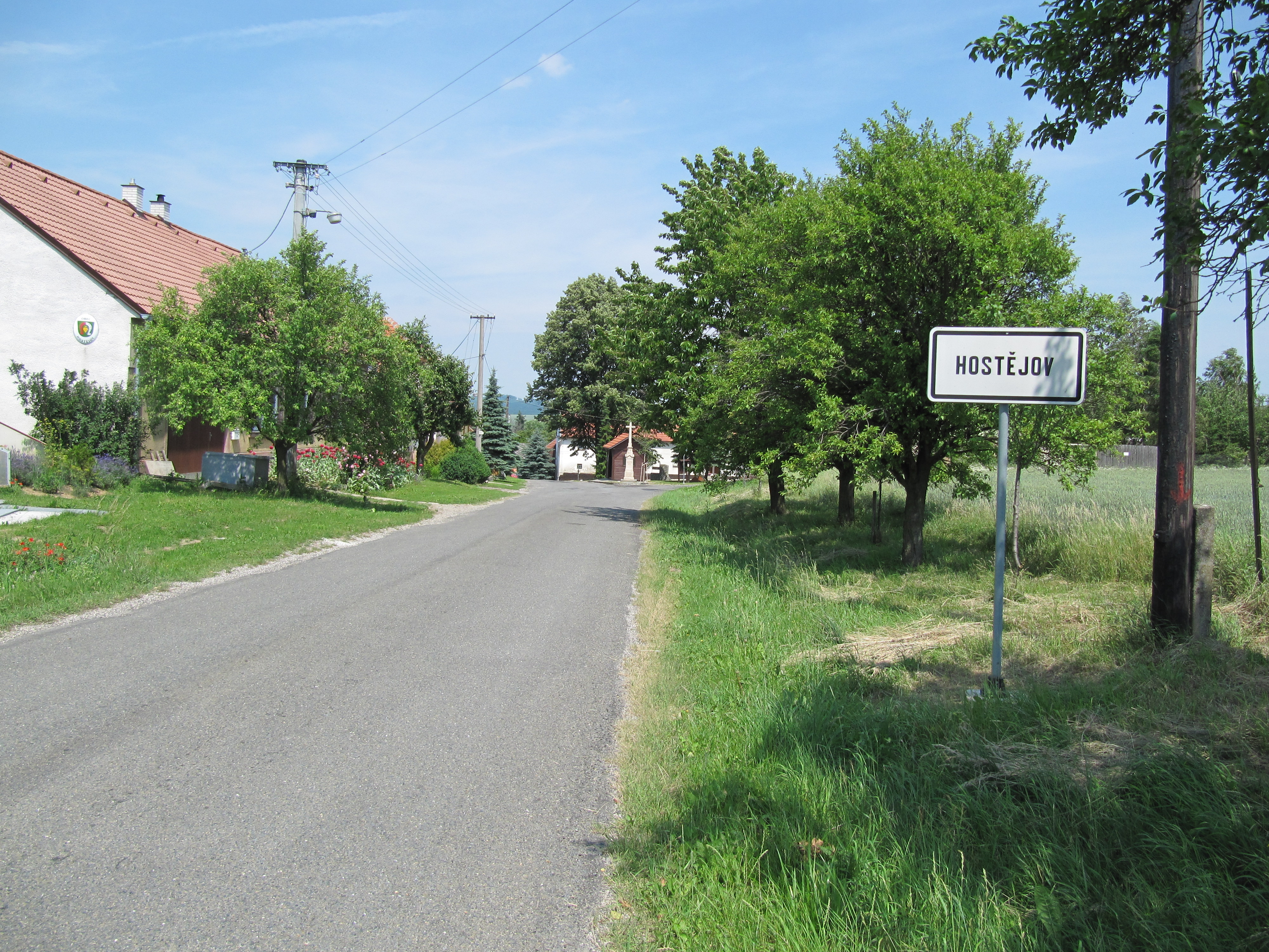 Hostějov